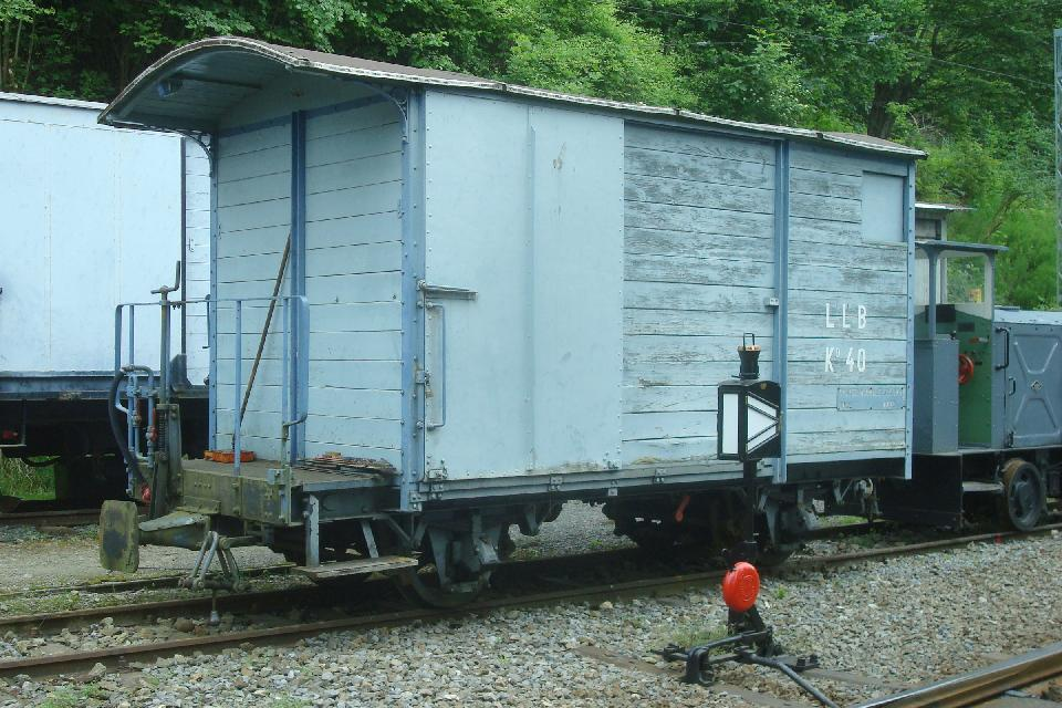 Gedeckter Güterwagen K2 40 der ehemaligen Leuk–Leukerbad-Bahn (LLB), heute Verkehrsbetriebe Leuk–Leukerbad und Umgebung (LLB), bei der Museumsbahn Blonay-Chamby in Chaulin im Früling 2010.